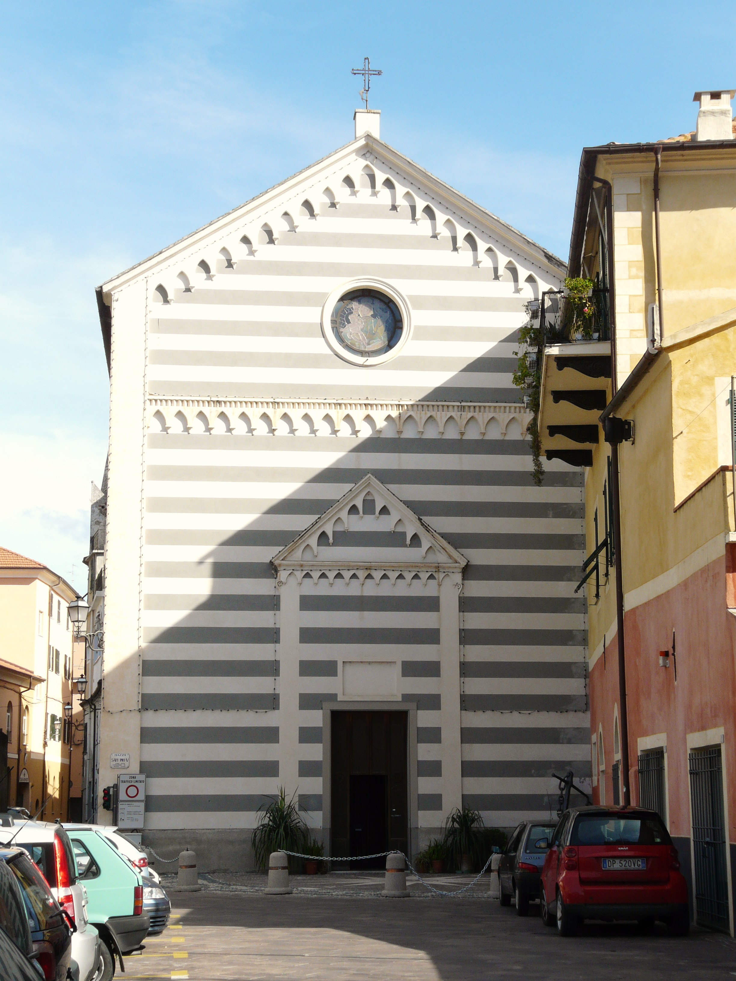 Chiesa dell'Annunziata, Pietra Ligure, Liguria, Italia